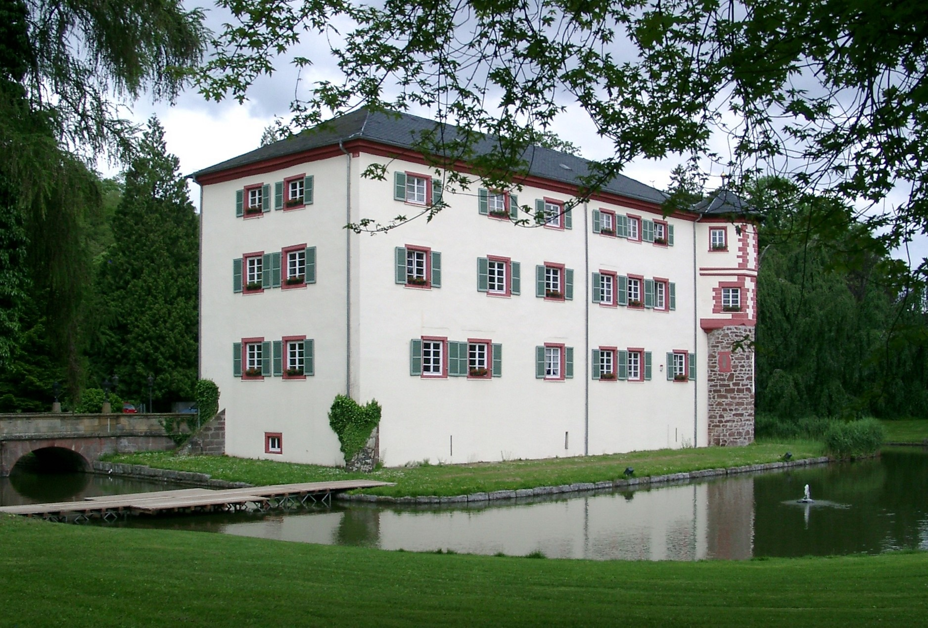 Angelbachtal, Ortsteil Eichtersheim, Schloß, u.a. genutzt als Rathaus. Das Angelbachtal ist eine Gemeinde mit etwa 5000 Einwohnern im Kraichgau, zwischen Sinsheim und Bruchsal